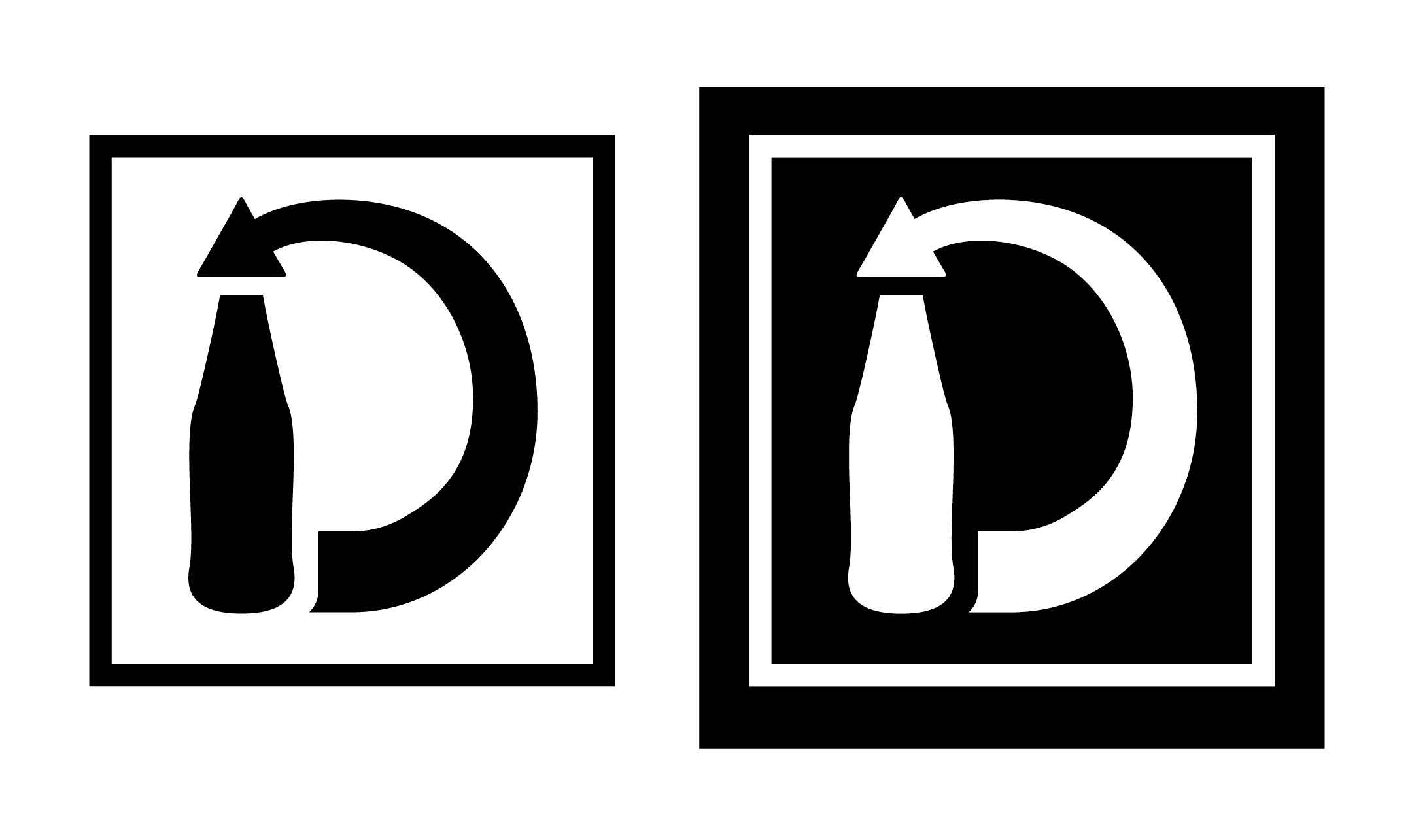 Ženklas, nurodantis, kad gėrimo pakuotė dalyvauja Lietuvos užstato sistemoje. Ženklas talpinamas ant etiketės. Pateikiami 2 variantai: pozityvas ir negatyvas.